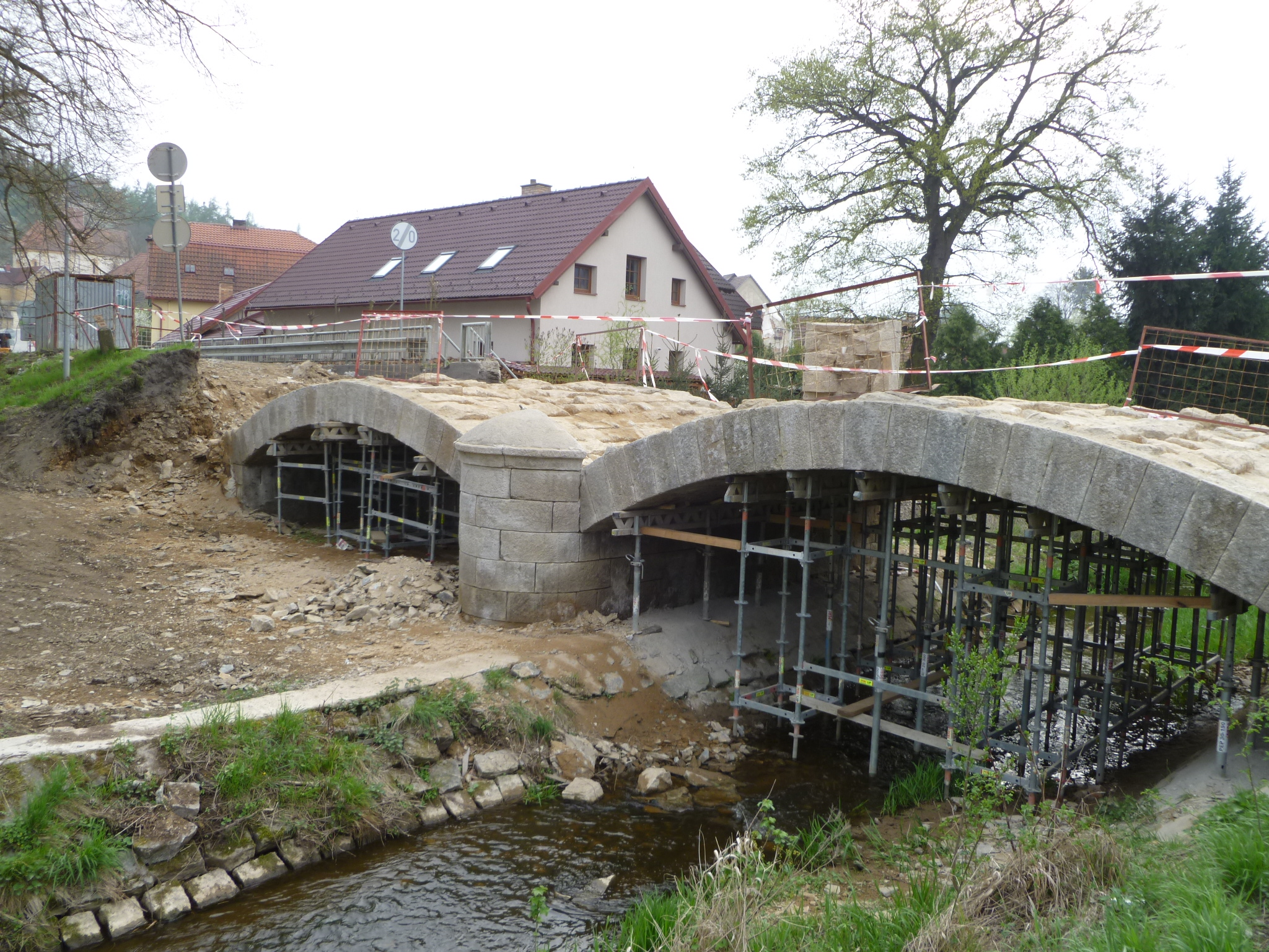 Totální oprava starého mostu v Libři přes Zahořanský potok.